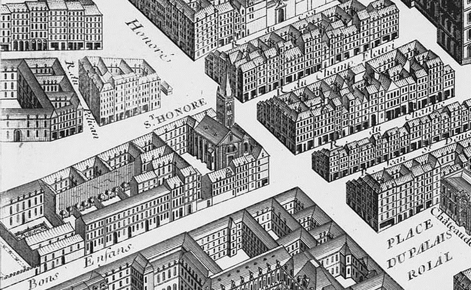 La collégiale Saint-Honoré sur le plan de Turgot.